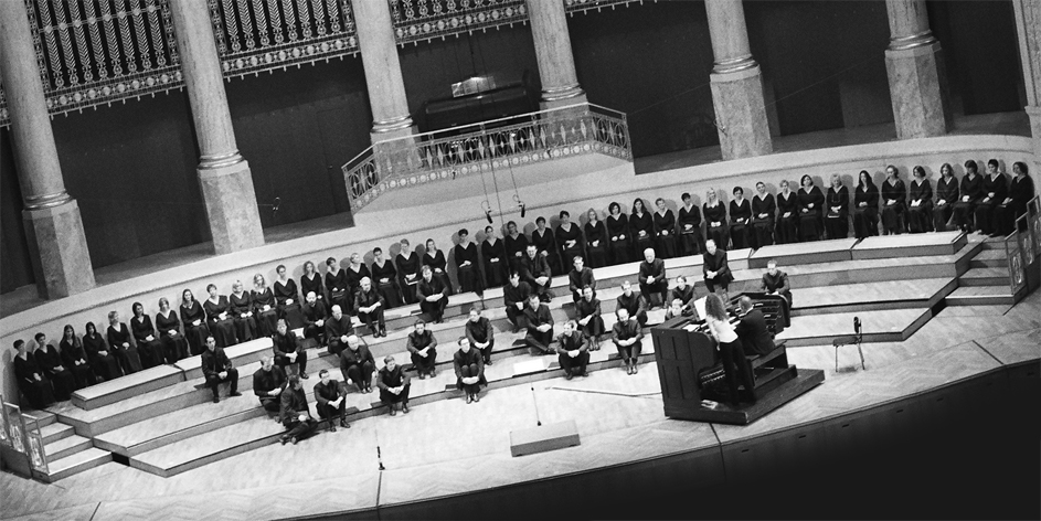 Wiener Singakademie; Wiener Konzerthaus, Großer Saal